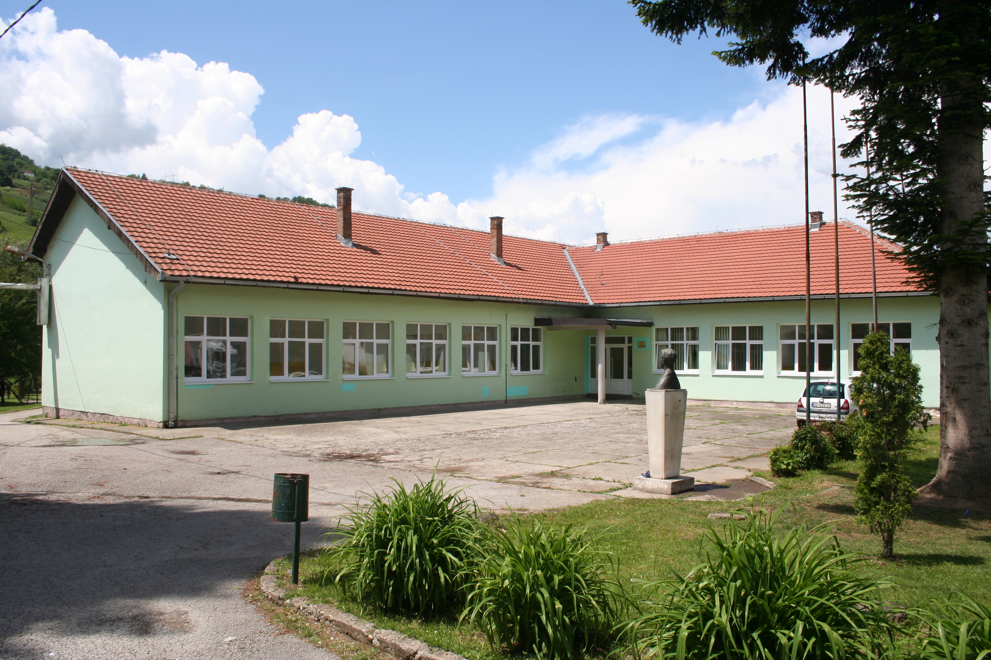 Pilica, škola